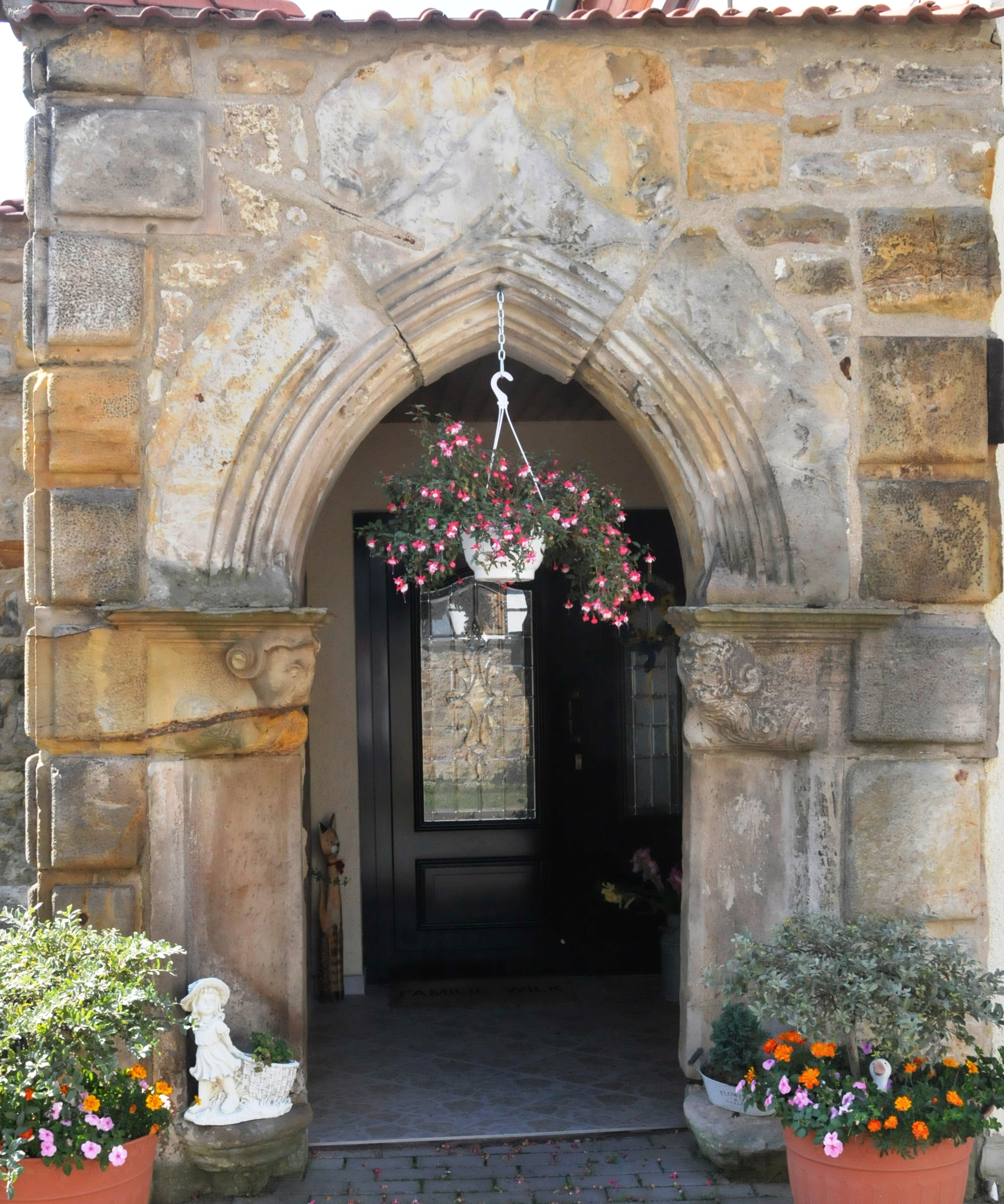 Pferdingsleben, Hauseingang Kirchstraße 60